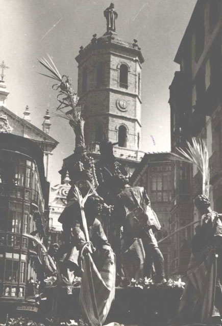 Catedral. Procesión de las Palmas - Valladolid - Fotografía de la Catedral. Torre. Detalle. Procesión de las Palmas. Borriquilla. - Fotografía 75 x 105 mm B/N